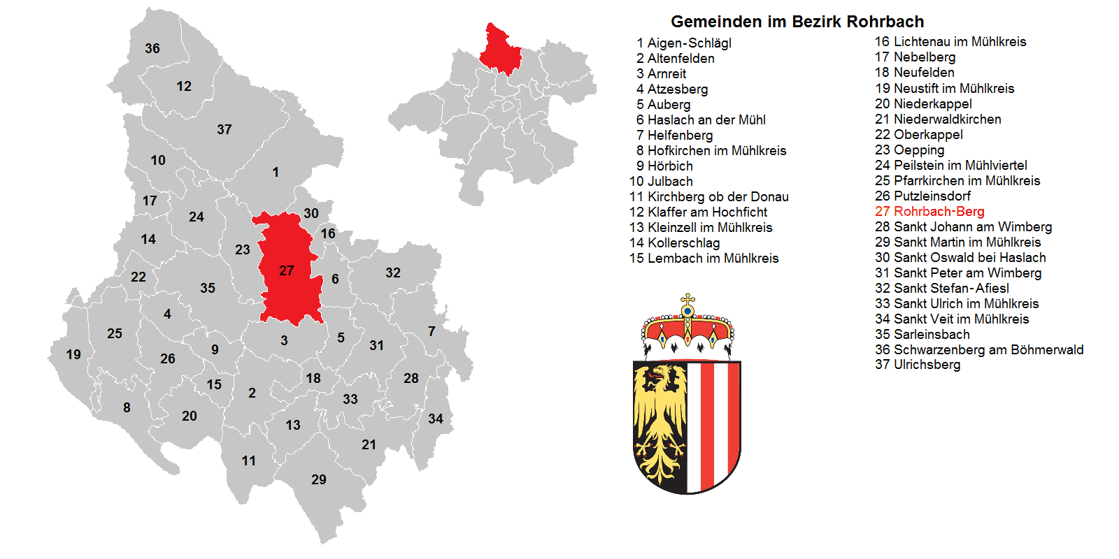 Bezirk Rohrbach